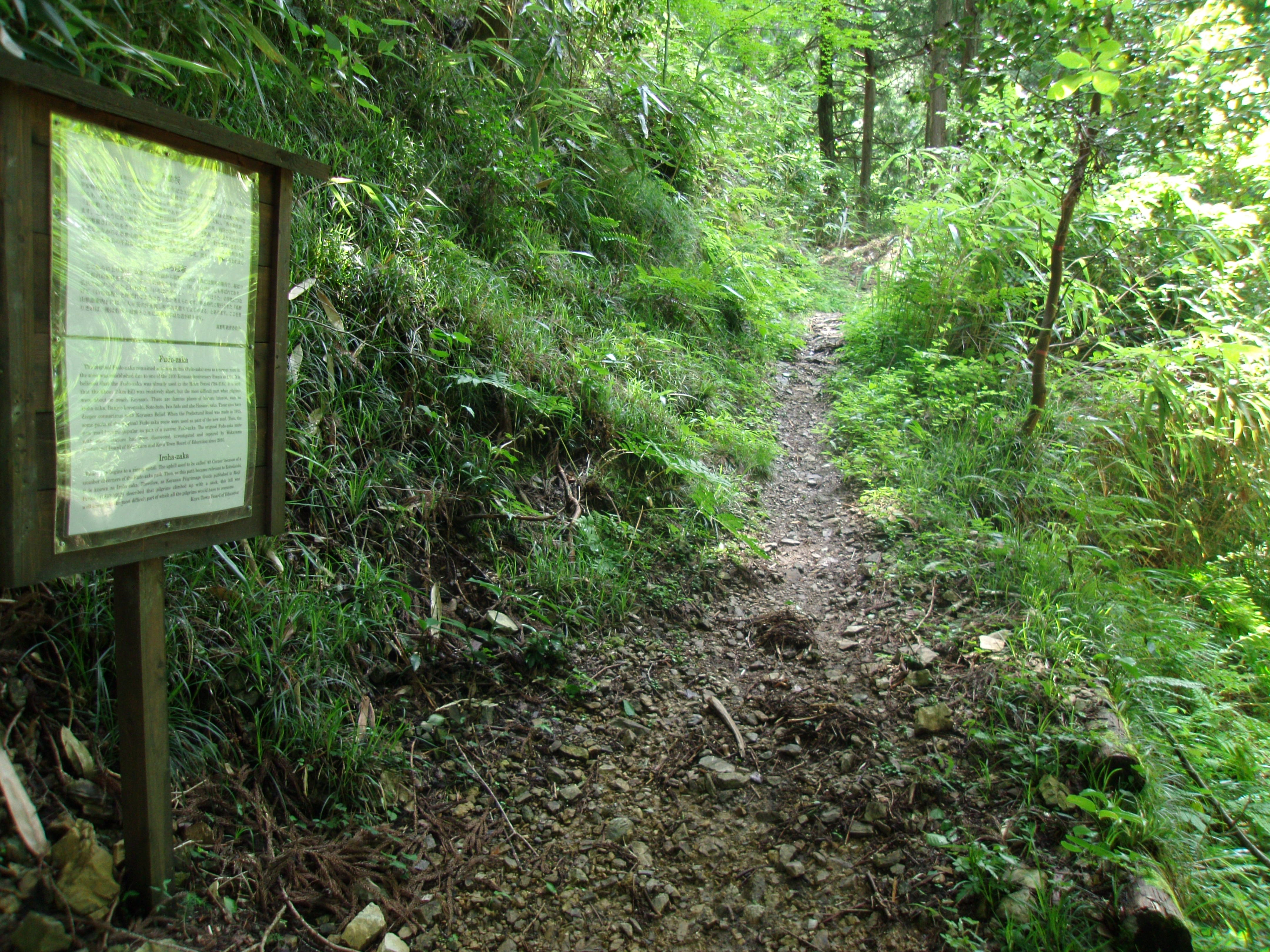 2016年に世界遺産「紀伊山地の霊場と参詣道」に「高野参詣道」として追加登録された京大坂道（きょうおおさかみち）の不動坂旧道